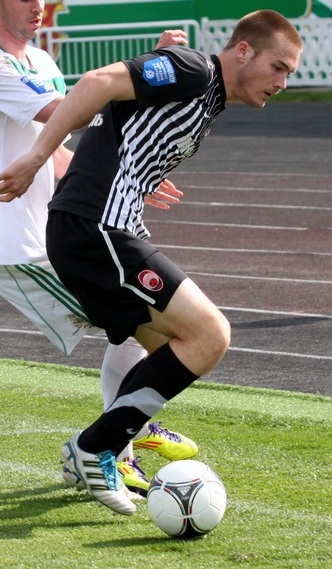 Тони Шунич